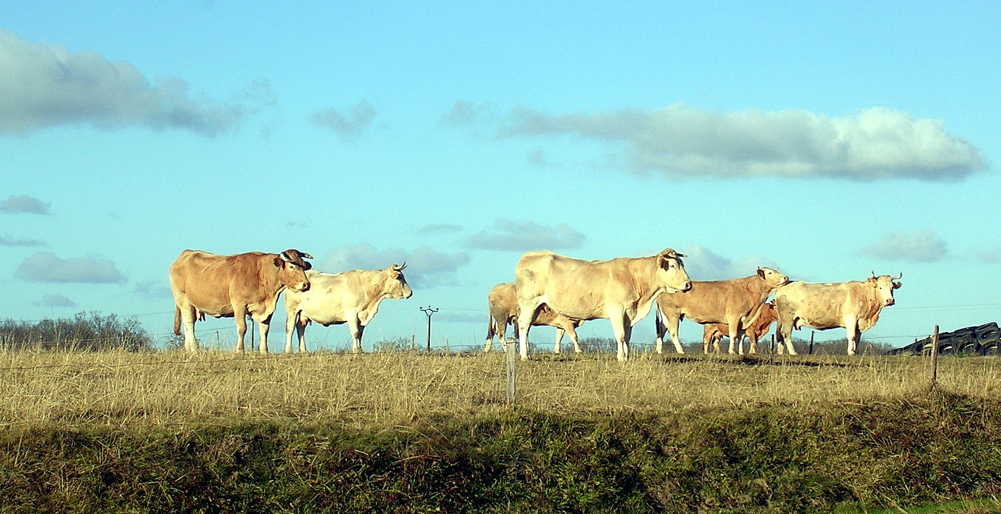 Vaches reproductrices exploitées pour la filière Bœufs de Chalosse, photo prise à Eyres-Moncube, dans le département français des Landes